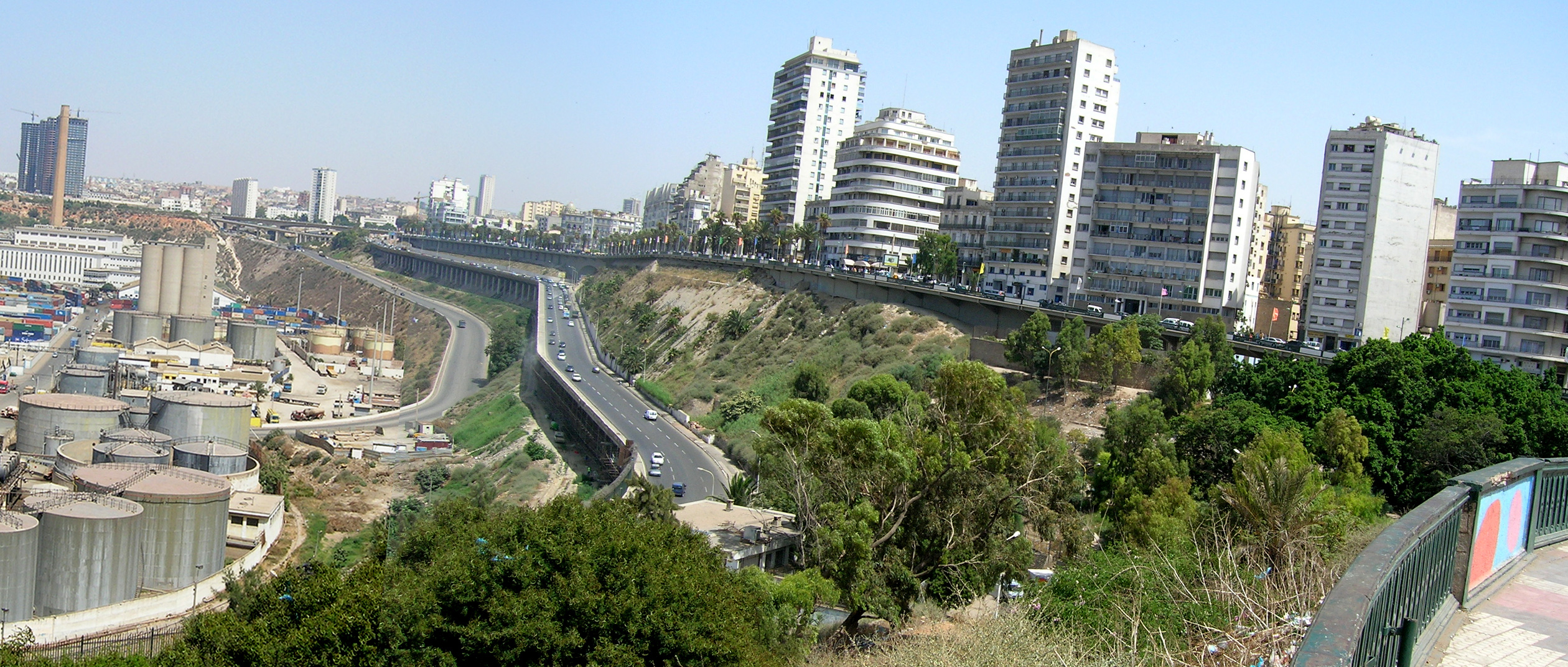 Oran - Front de mer